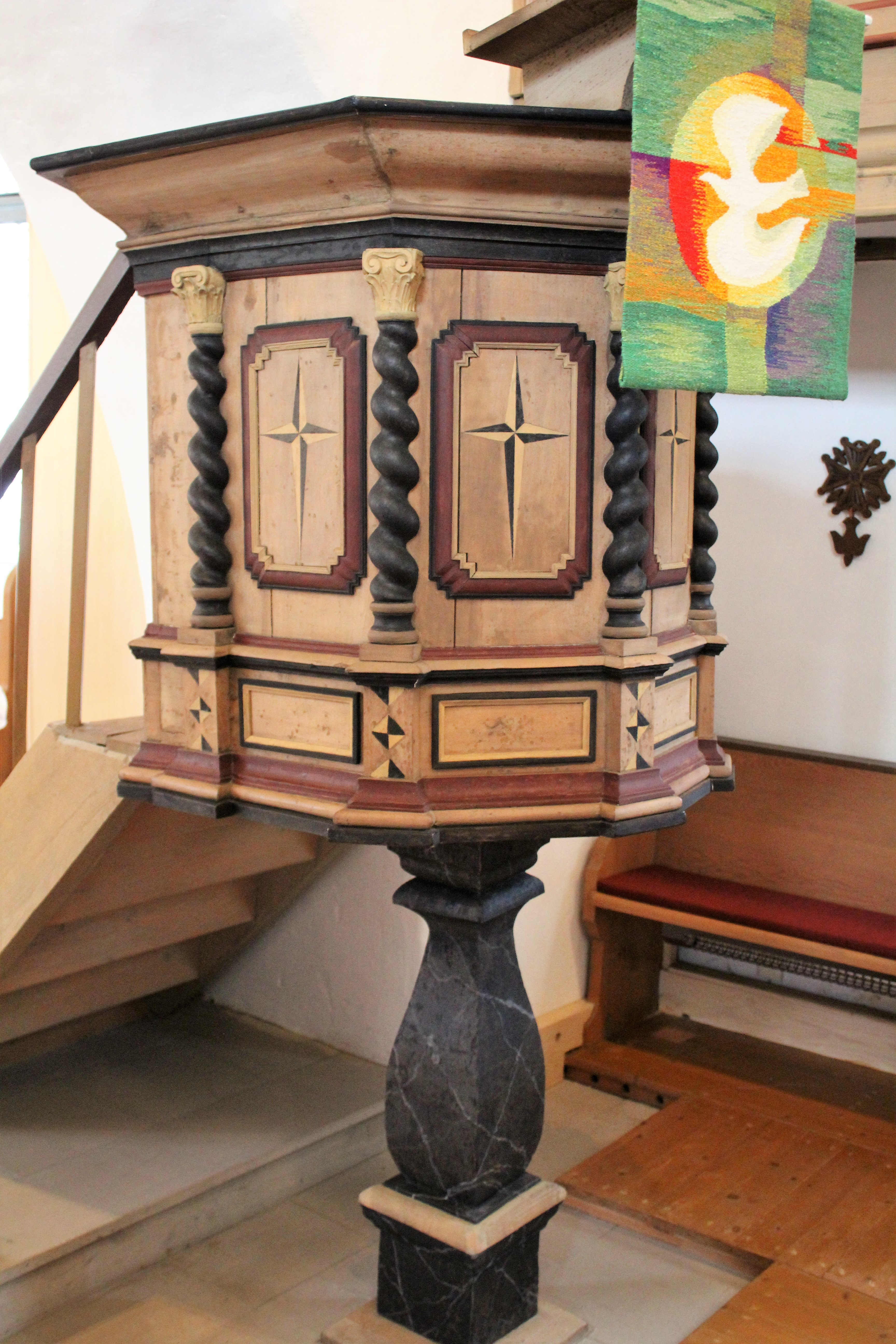 Evangelische Kirche Daubhausen, Lahn-Dill-Kreis, Hessen, Deutschland